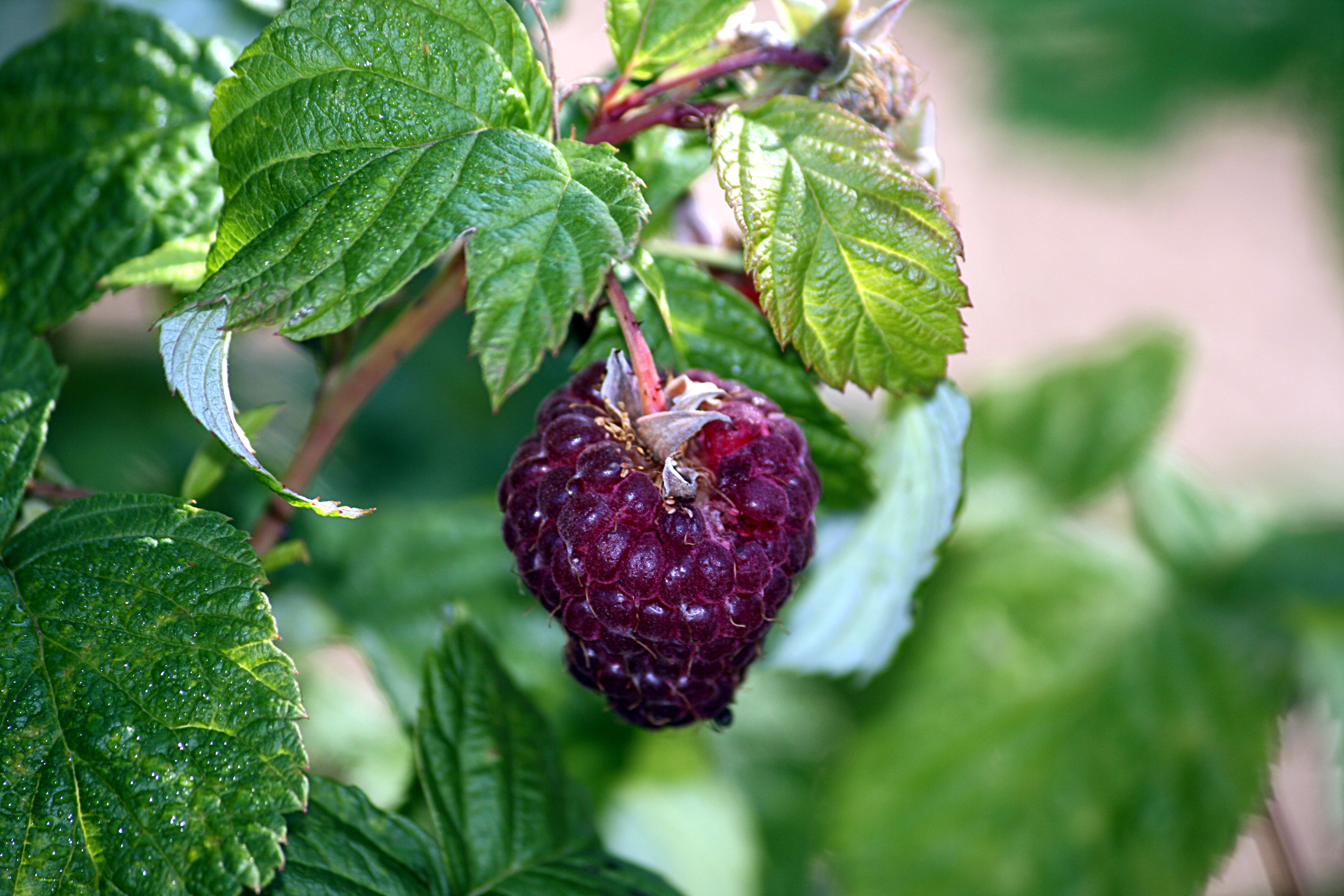 Rubus_idaeus_-raspberry_-_Himbeere